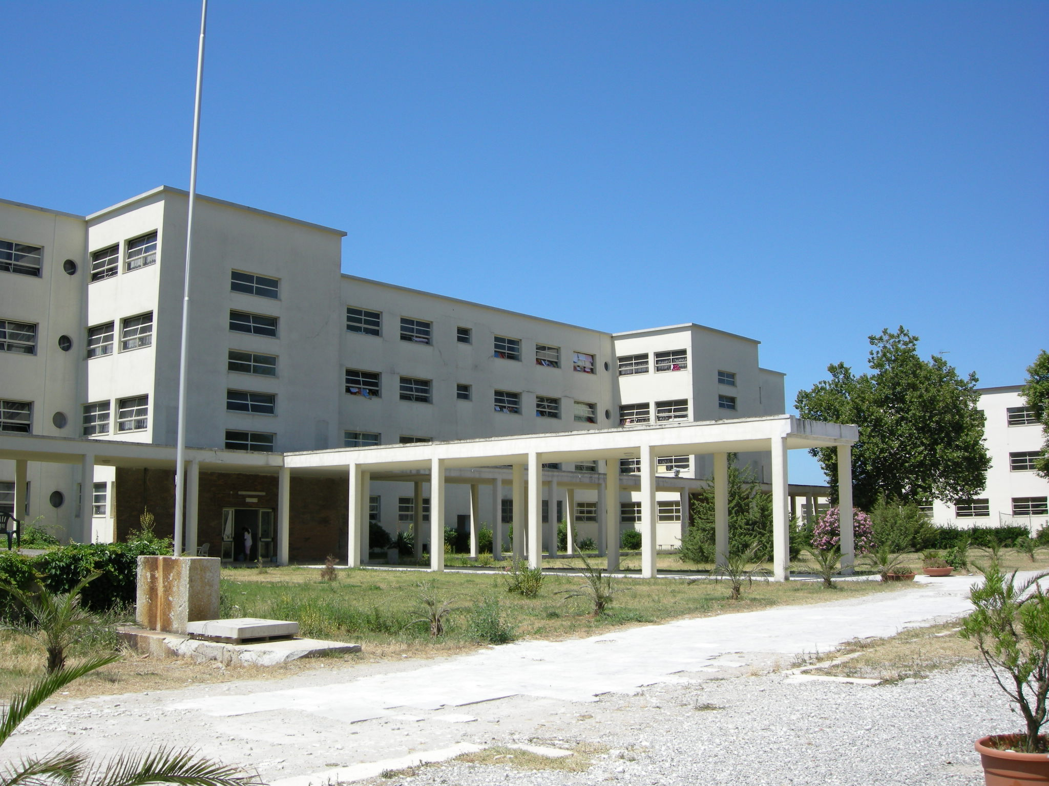 Colonia Torino